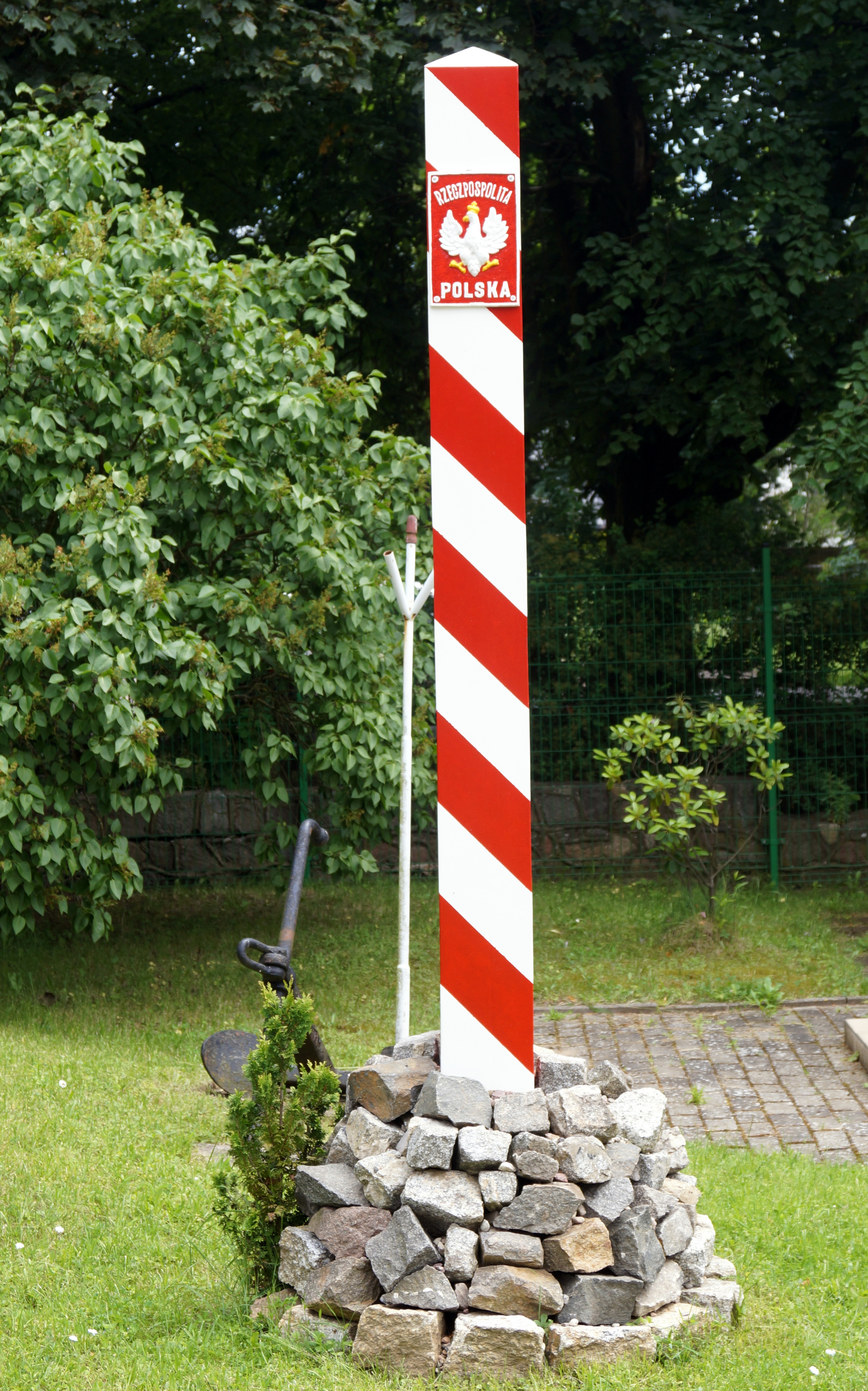 Słup graniczny używany na granicy polsko-sowieckiej w okresie międzywojennym. Replika wykonana przez pracowników Archiwum Straży Granicznej w Szczecinie i umieszczona na terenie placówki SG w Szczecinie.